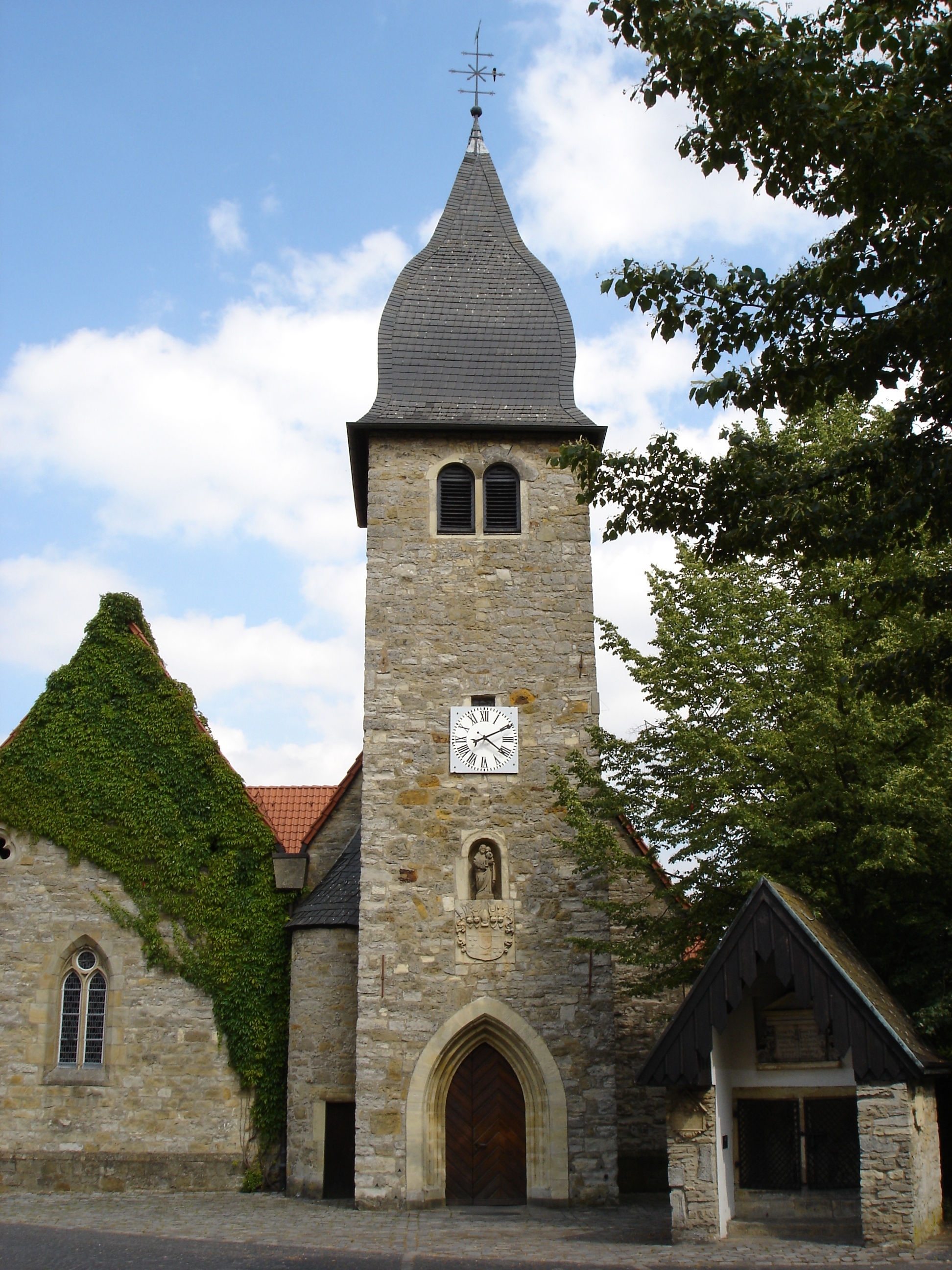 Die St. Josef-Kirche im Stadtteil Kinderhaus in Münster, Westfalen, Germany